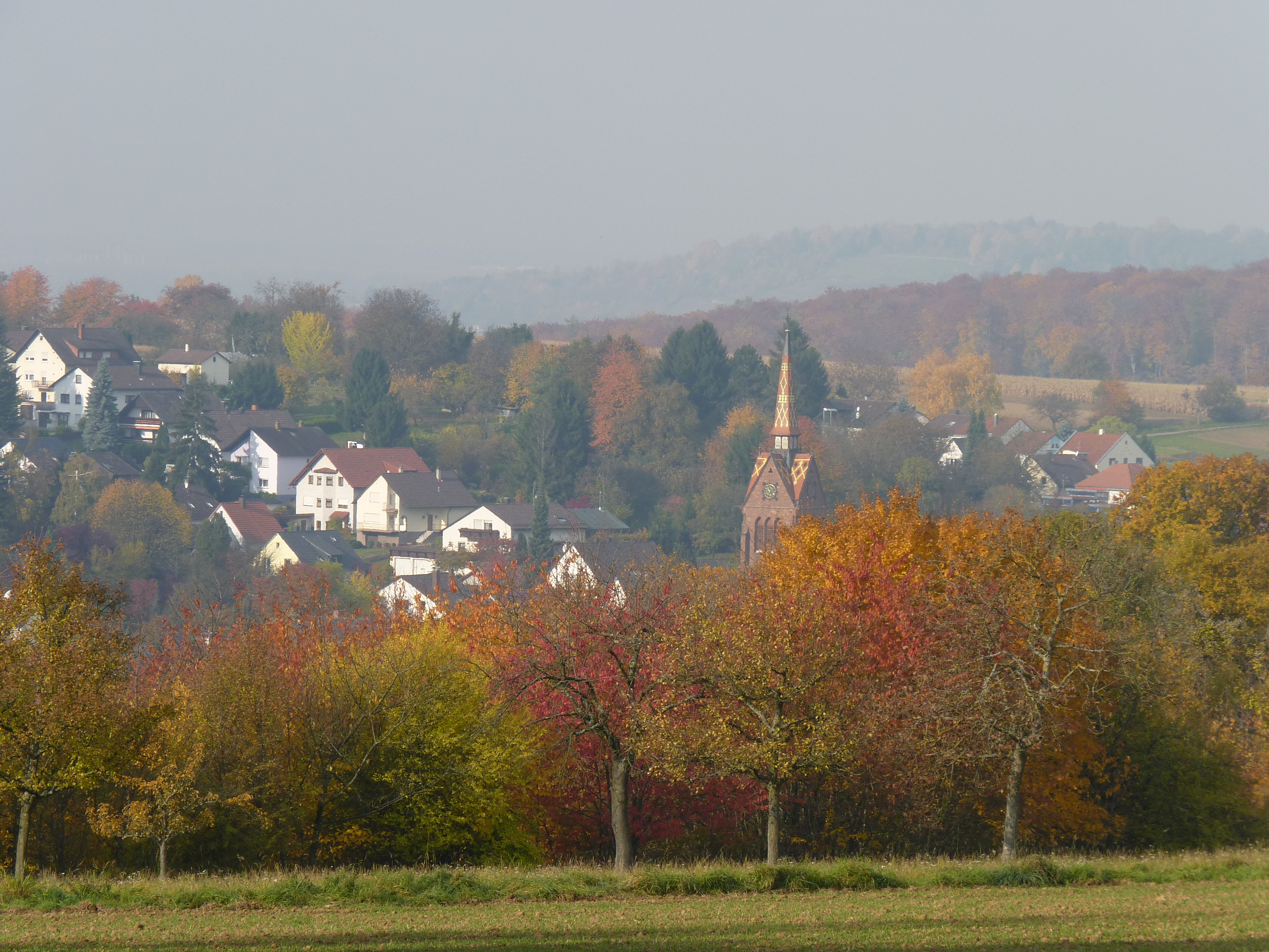 Blick über Wöschbach, Gemeinde Pfinztal, Baden-Württemberg, Deutschland